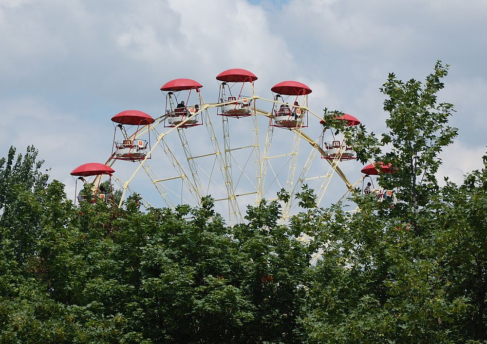 Panorámakerék a Budapesti Vidámparkban. Budapesti Vidám Park, Budapest, XIV. kerület, Magyarország.